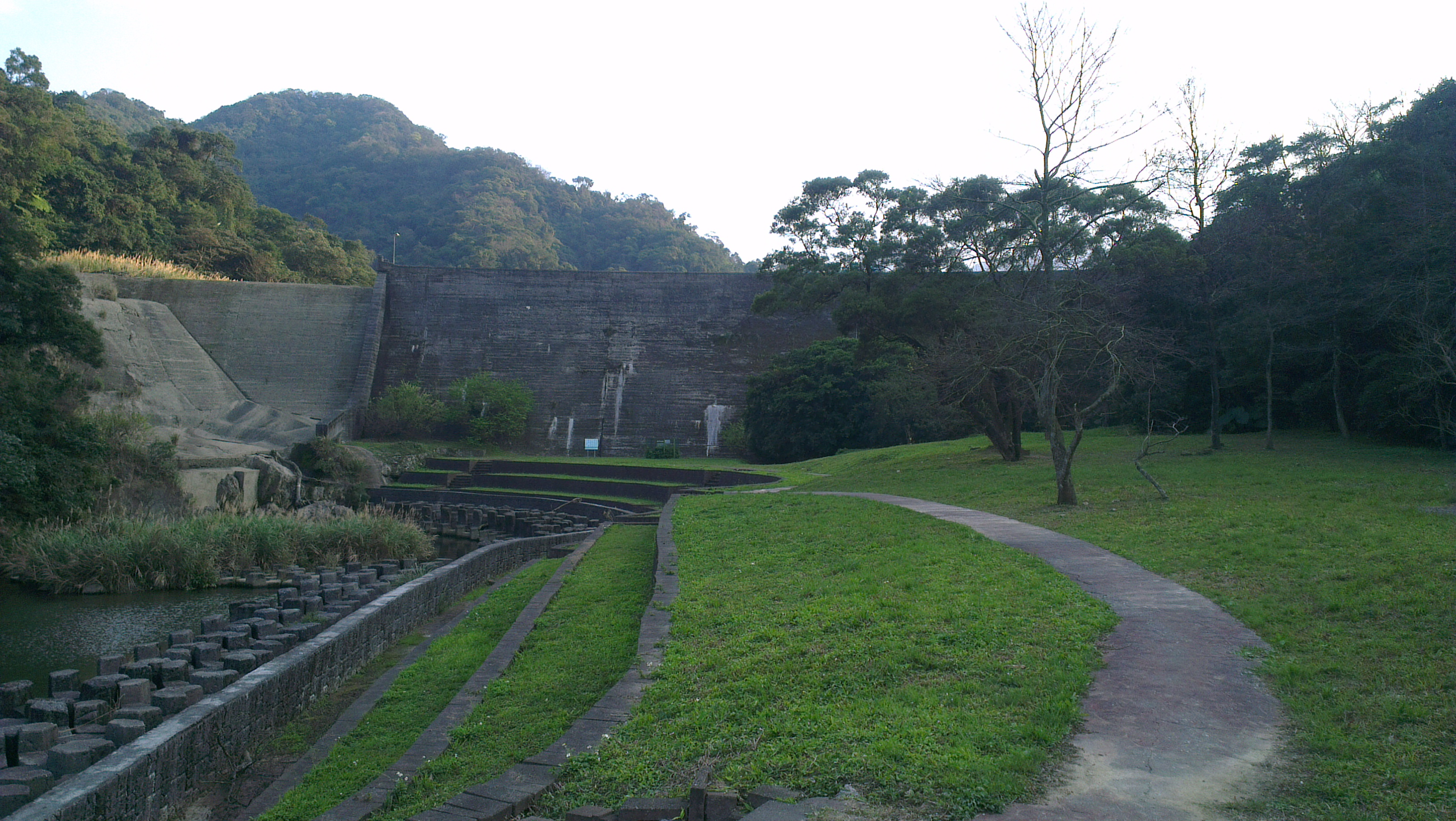 中文（台灣）: 西勢水庫